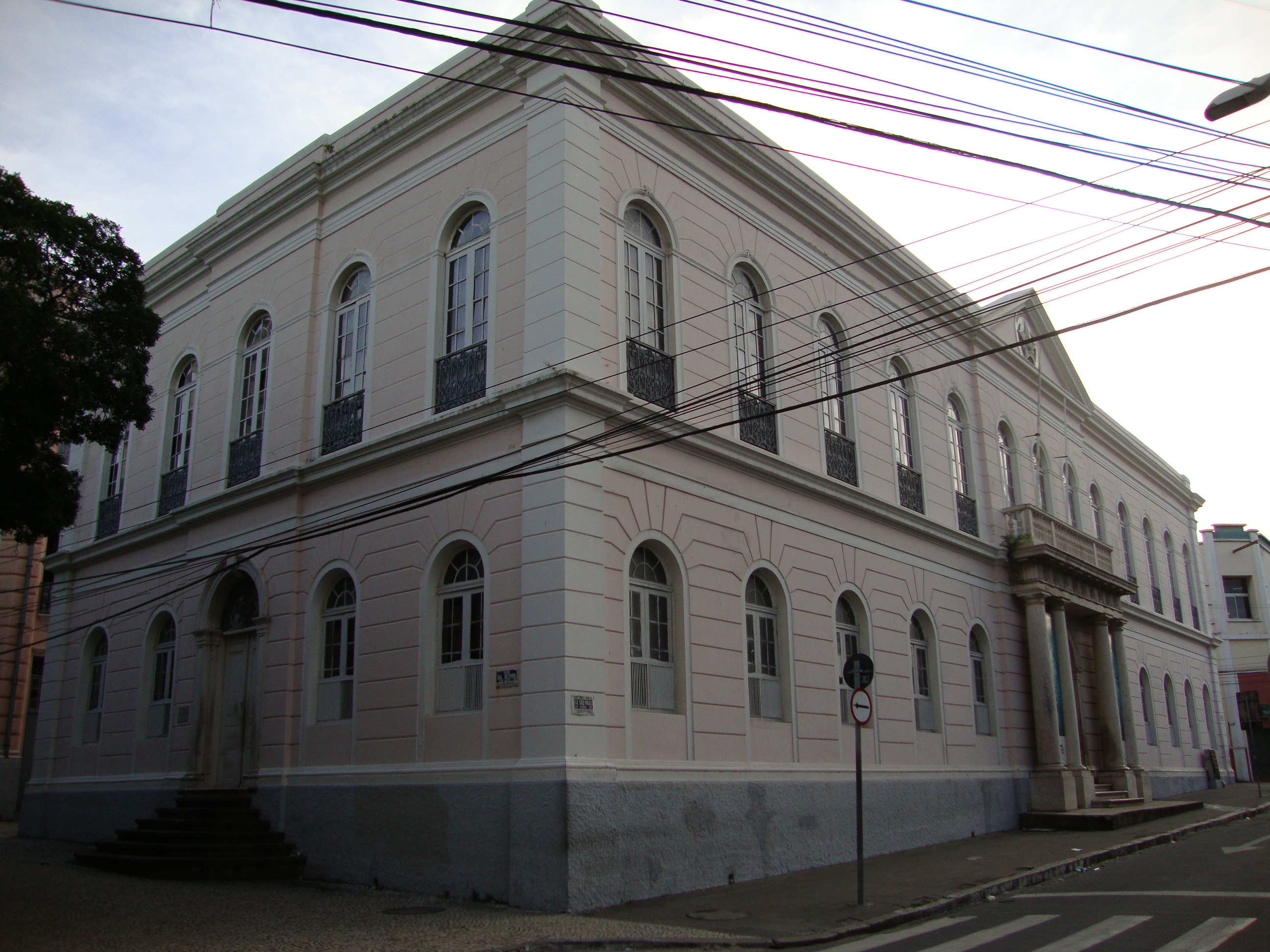 Palácio Senador Alencar, atualmente funciona como Museu do Ceará, em Fortaleza, Ceará, Brasil.